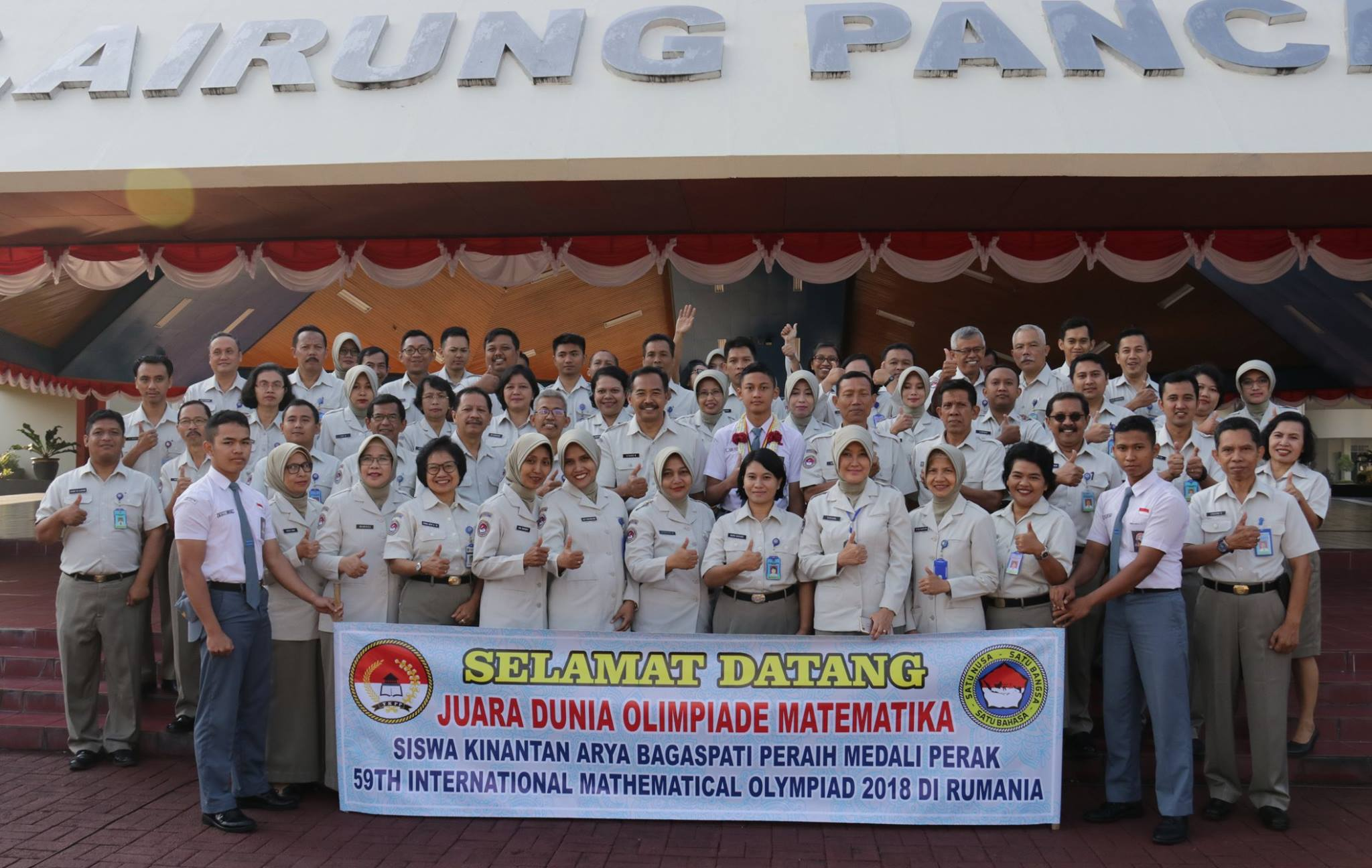 Penyambutan Kinantan sebagai Juara IMO 2018